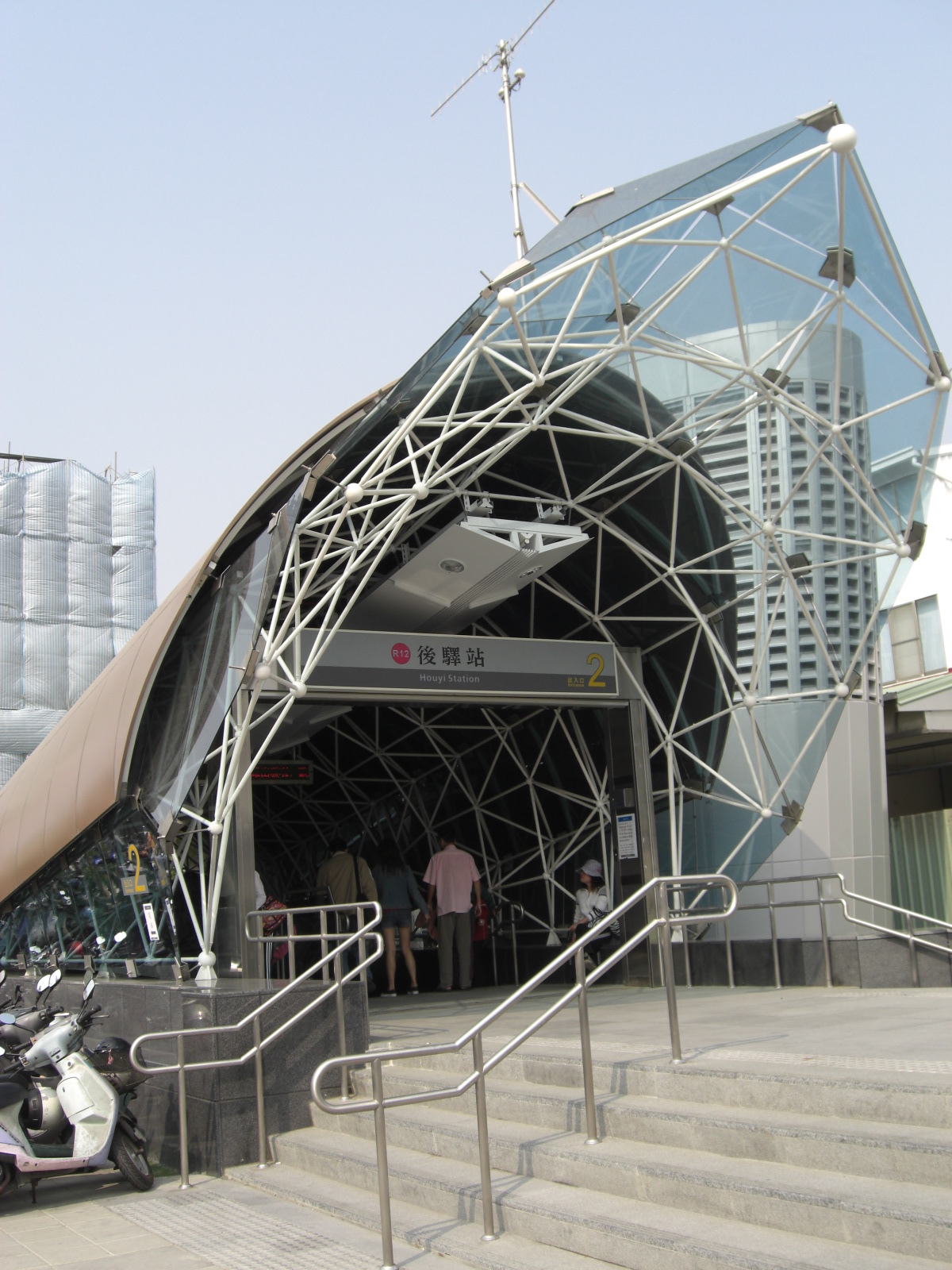 高雄捷運紅線後驛站